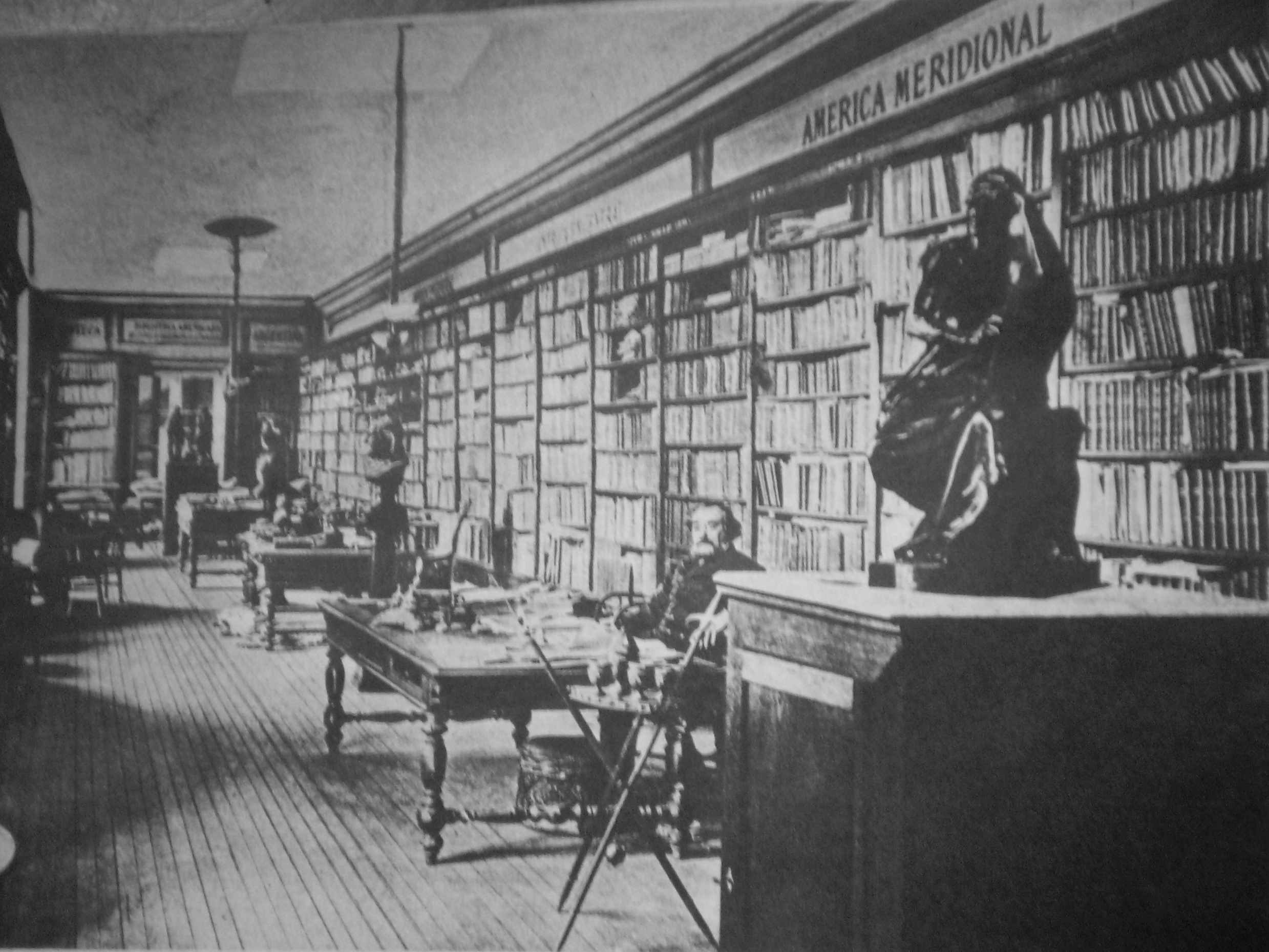 Bartolomé Mitre en su biblioteca en el año 1888